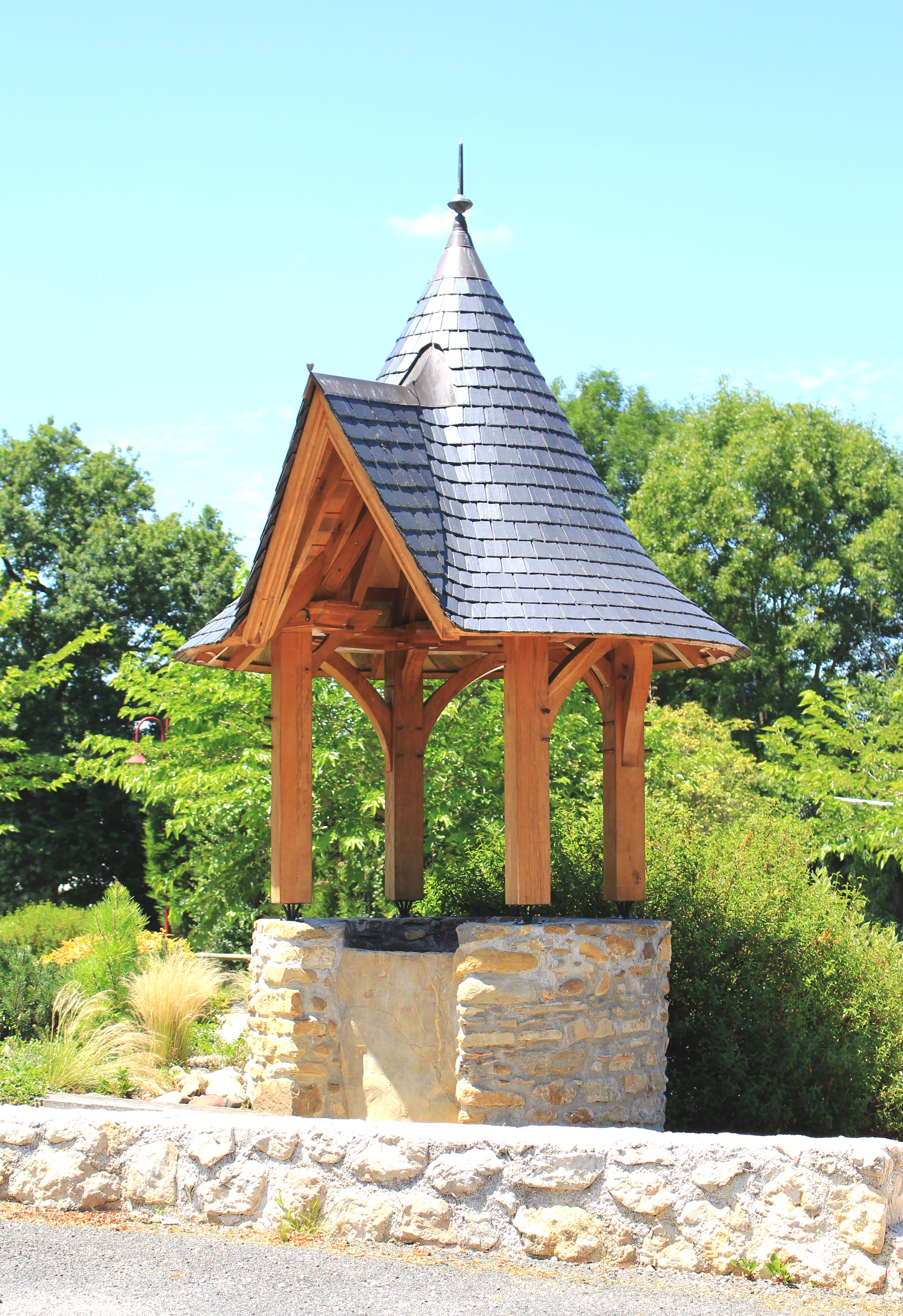 Puits de Chelle-Spou (Hautes-Pyrénées)